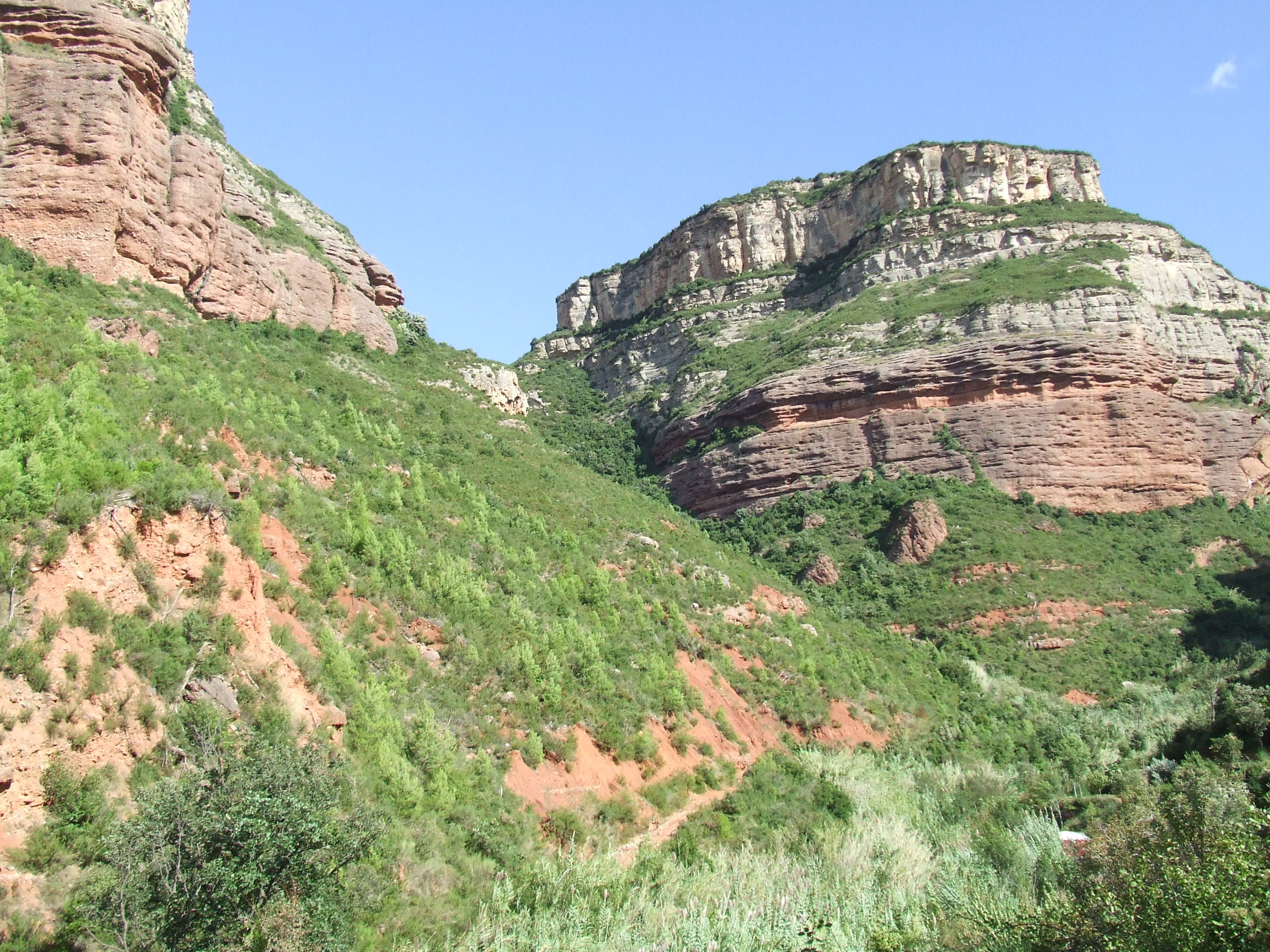 El Sot de l'Ullar, a Vallderrós (Riells del Fai, Bigues i Riells, Vallès Oriental)